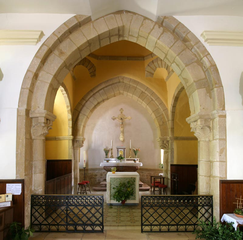 Choeur de l'église de Ligny-en-Brionnais